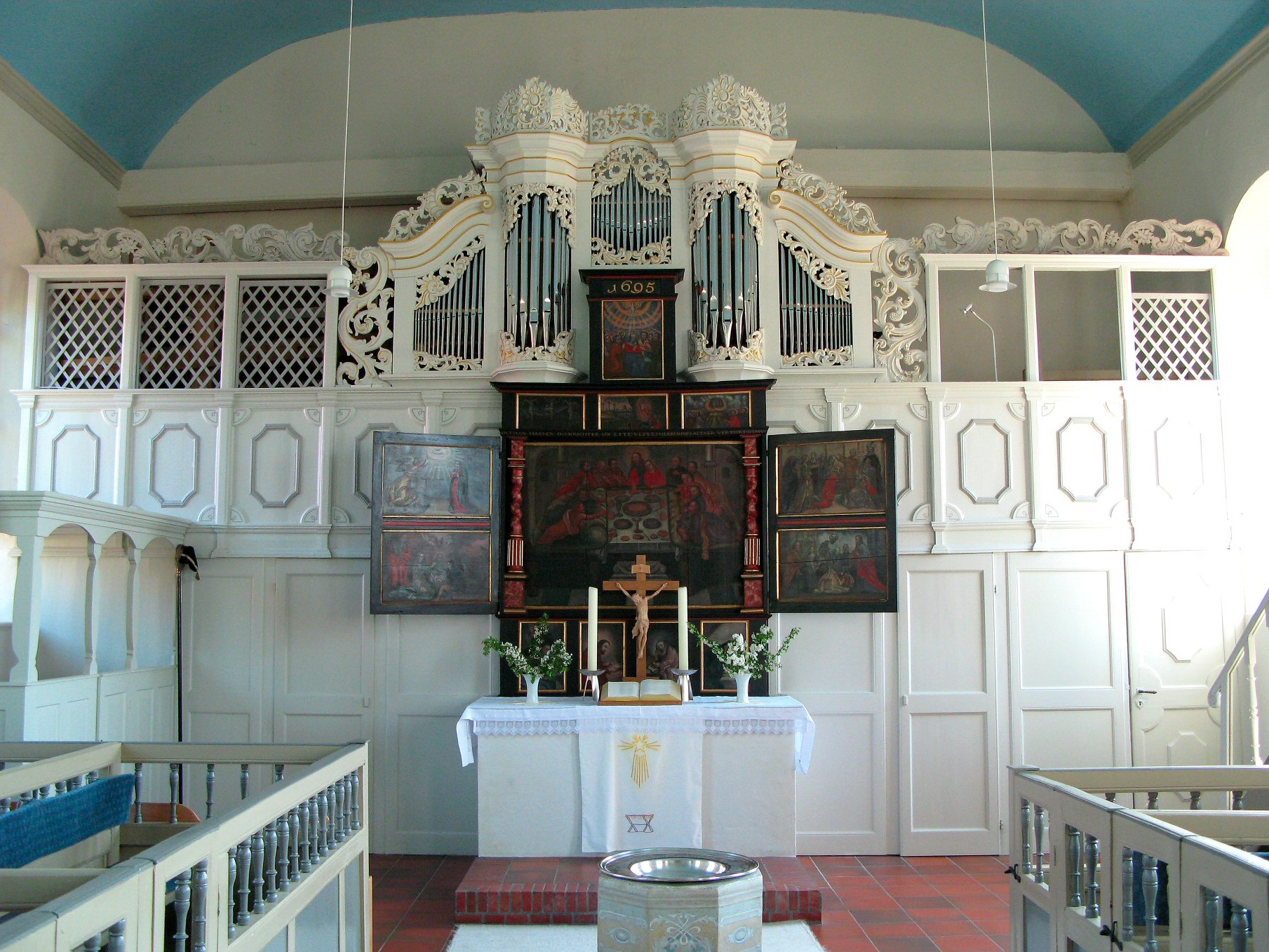 Orgel in Amdorf, Landkreis Leer